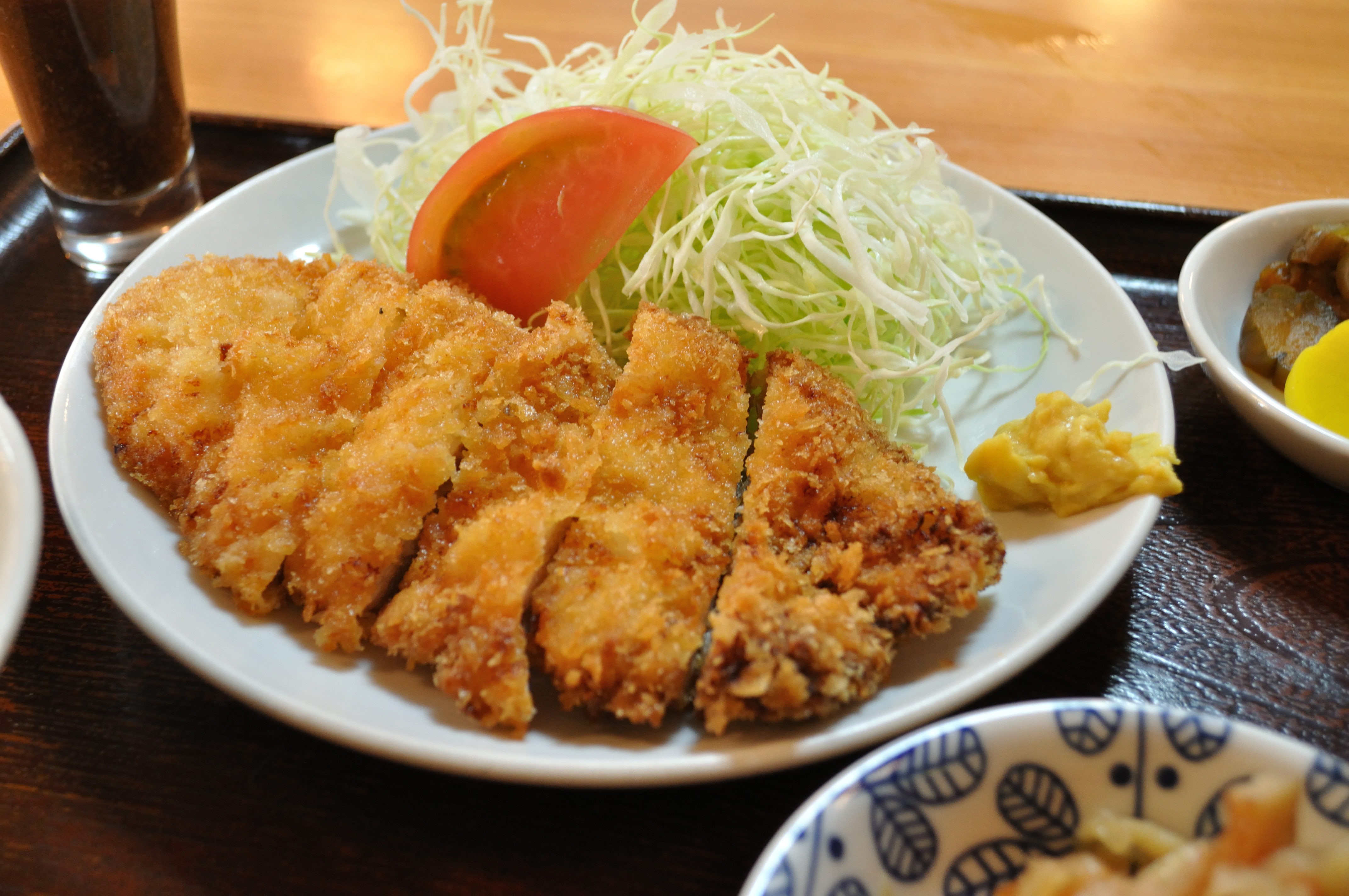 さいたま市岩槻区にある「永楽」のチキンカツ定食